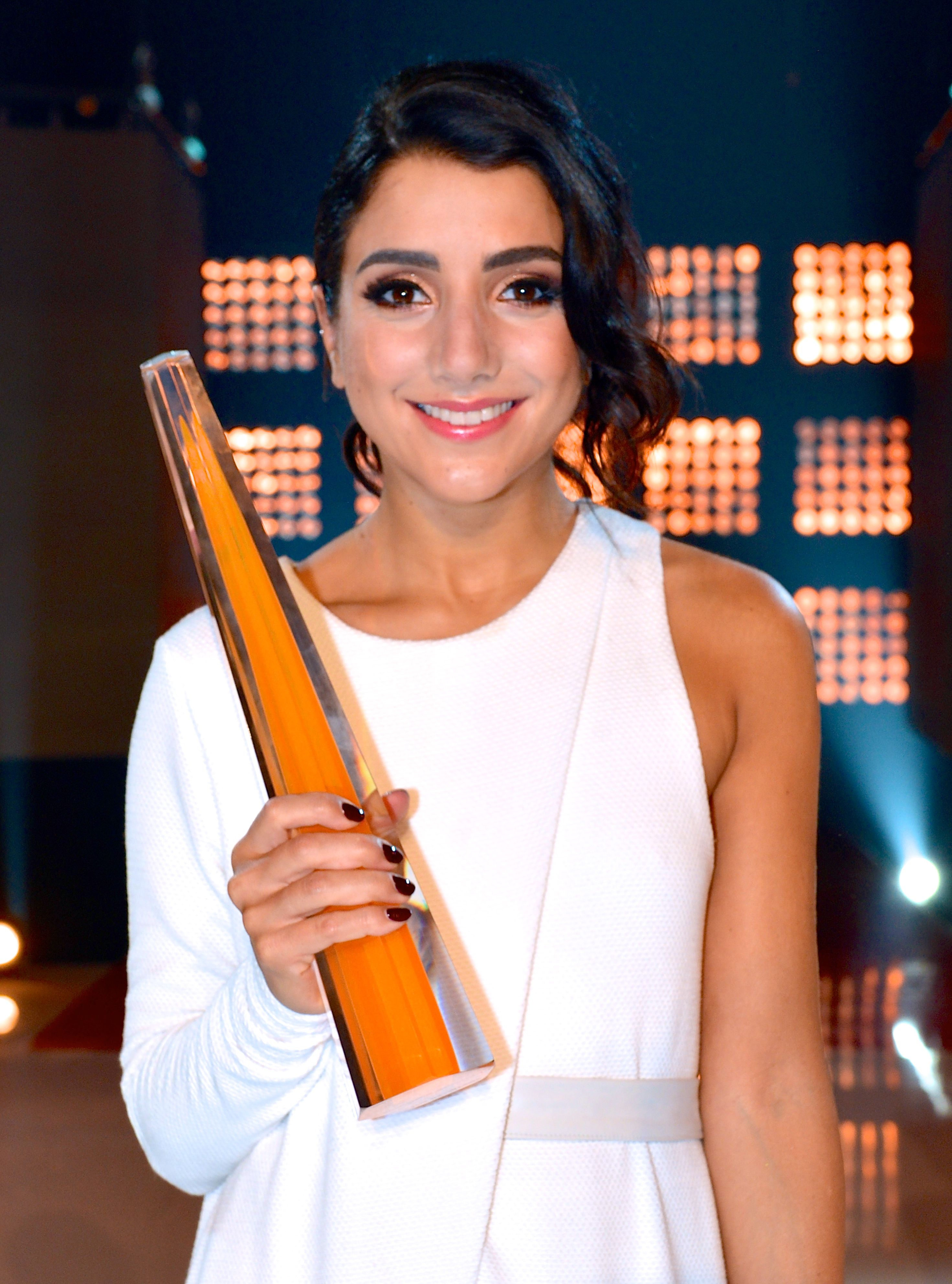 Gina Dirawi och André Pops blev vinnare av Kristallen på Kristallengalan den 30 augusti 2013. Gina Dirawi för Årets kvinnliga programledare och André Pops för Årets sport-tv profil.